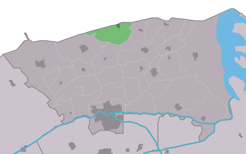 Kaartsje fan himrik fan Wierum